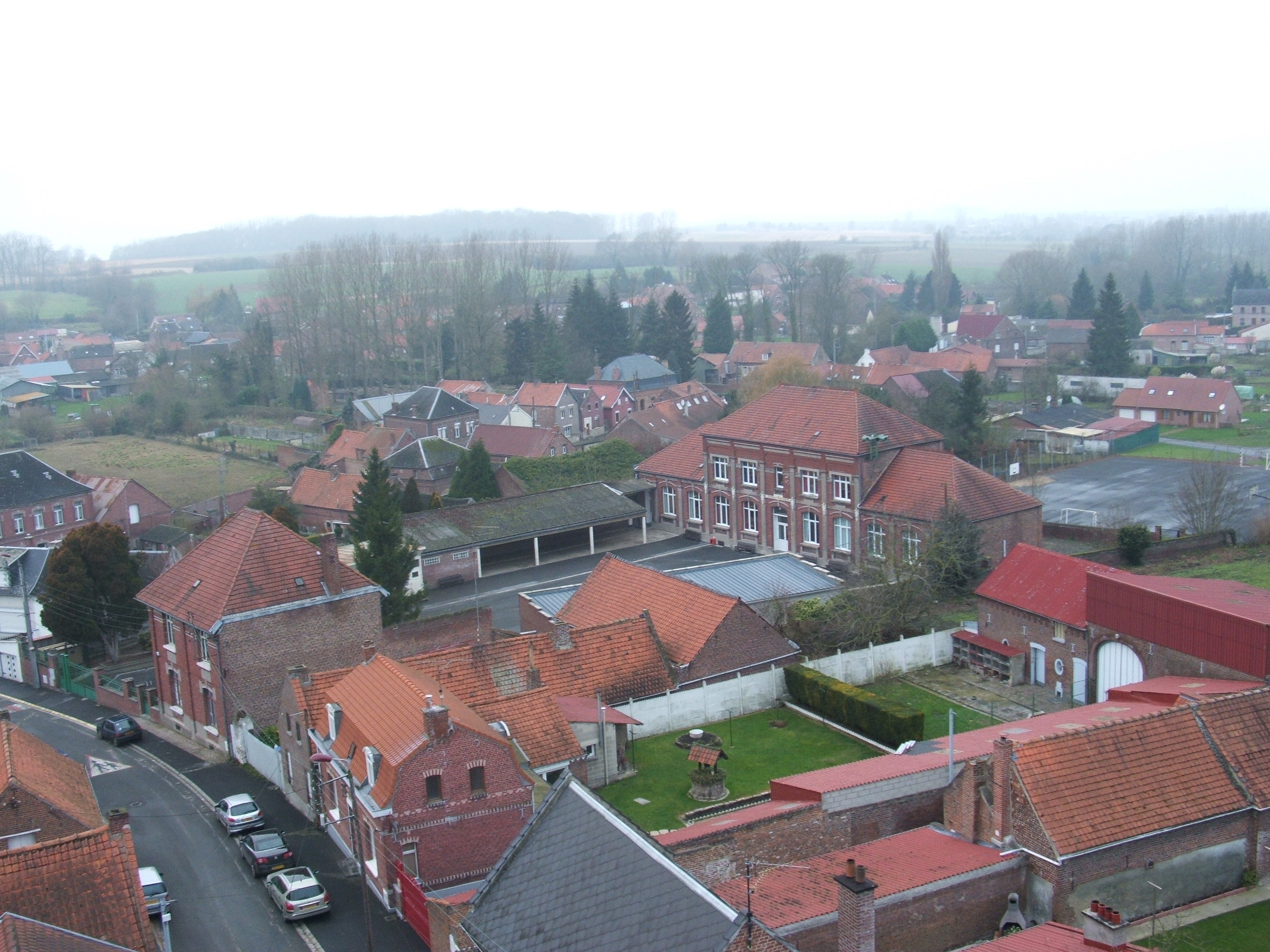 école de Saulzoir